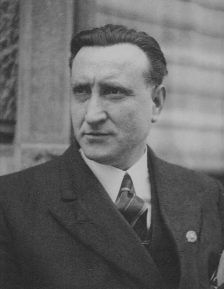 Fotografia di Giuseppe Malagodi, sindacalista, politico e antifascista italiano.